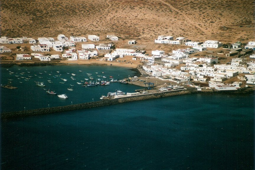 Caleta del Sebo, La Graciosa, Kanarische Inseln